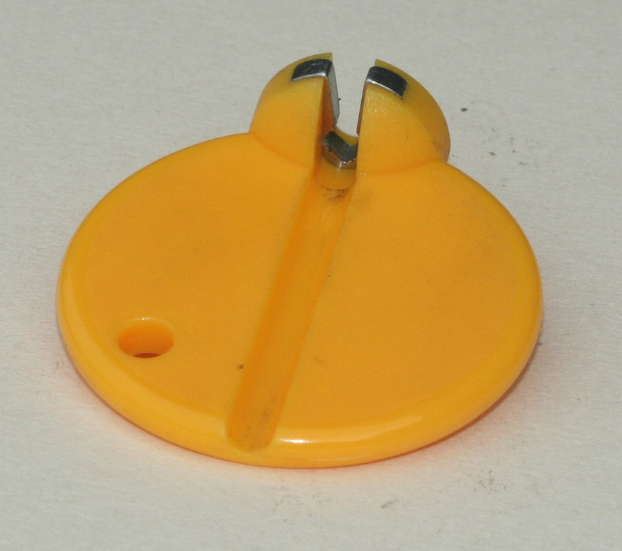 bicycle spoke key ('Spokey')